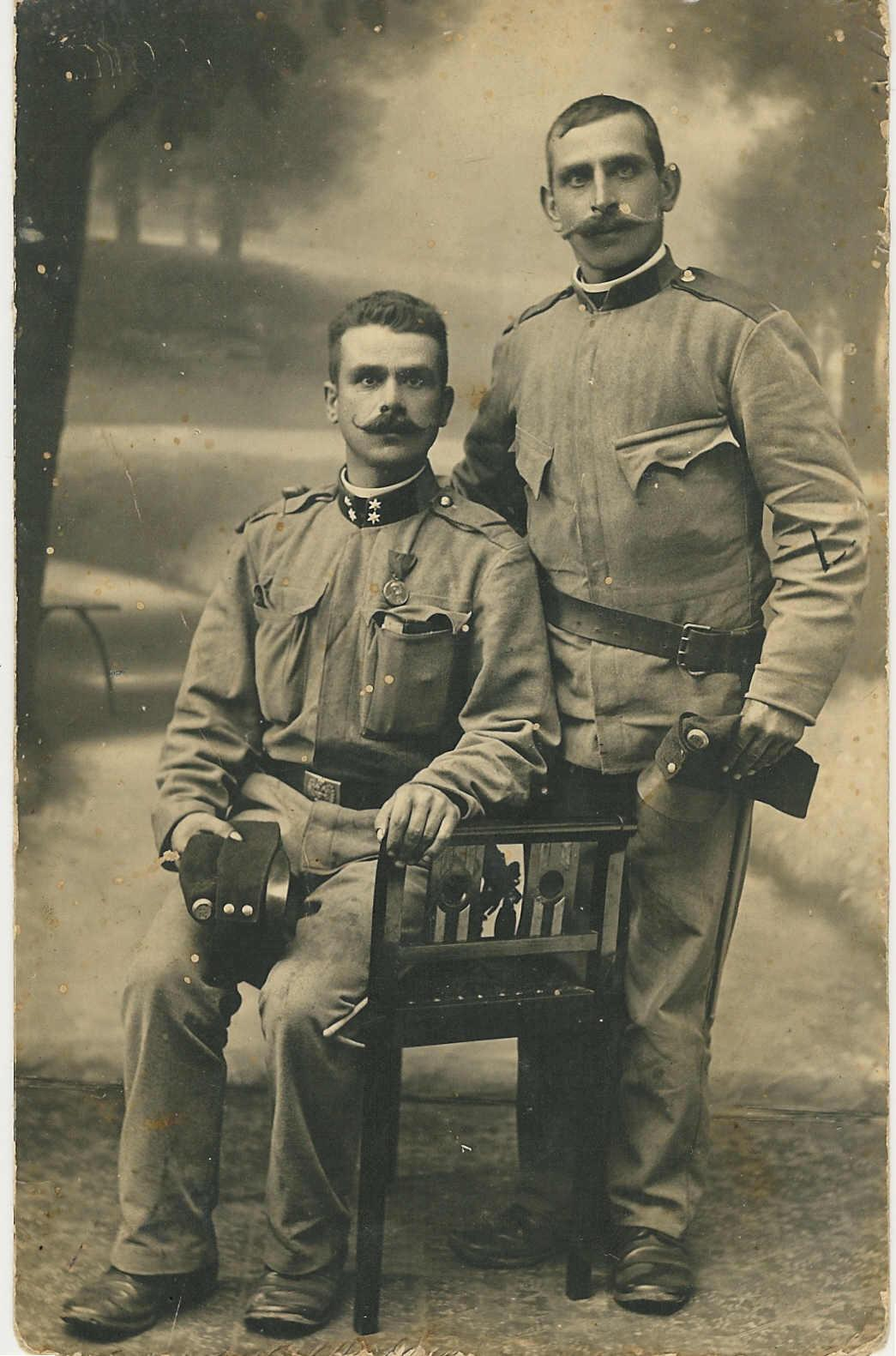 Antoni Kucharczyk (po lewej; 1874-1944, poeta ludowy, podpisujący się różnymi pseudonimami) z bratem Michałem, 1915.